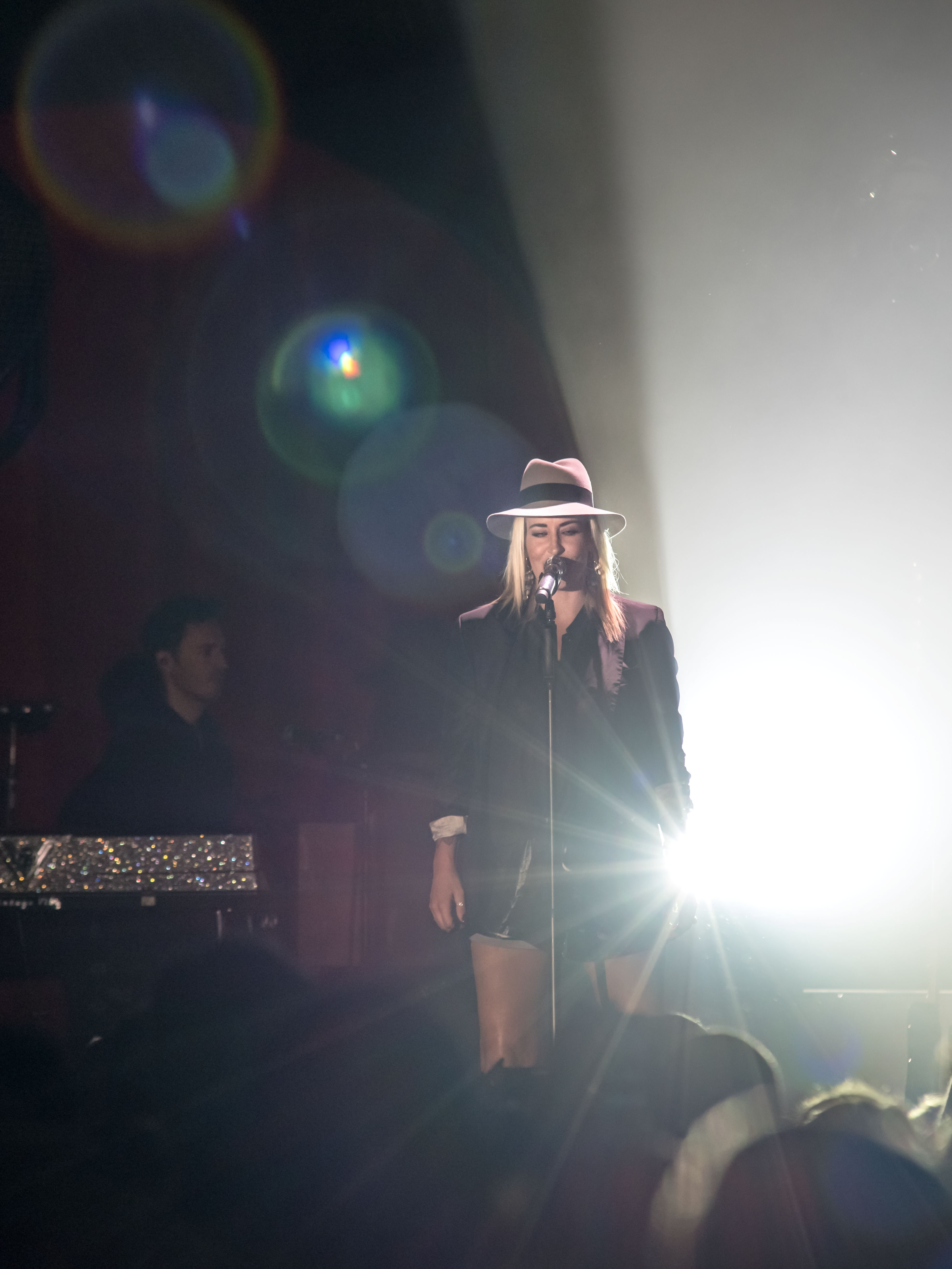 Bilder vom Zelt Musik Festival 2016 in Freiburg im Breisgau Sarah Connor